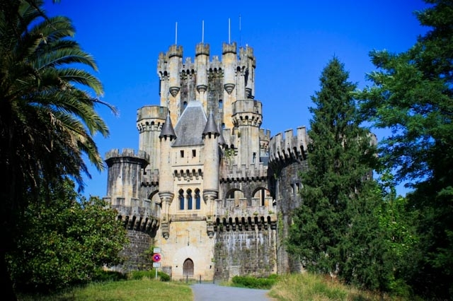 El castillo de Butrón, en euskera Butroe o Butroeko gaztelua, es un edificio de origen medieval ubicado en el término municipal de Gatica, en la provincia de Vizcaya, España. Está rodeado de poblaciones que distan poco entre sí, como Guecho, Plencia, Munguía, Maruri y Lauquíniz. Los orígenes del edificio se remontan a la Edad Media, cuando existía en el lugar la casa-torre del linaje de los Butrón. Si bien su aspecto actual responde a una remodelación muy profunda, efectuada en el siglo XIX por el marqués de Cubas. Tomando como base los cimientos y parte de las torres cilíndricas, se erigió el resto según el gusto germánico, con gran dosis de fantasía, lejos del prototipo de castillo propio de la región. En cierta medida, tiene paralelismos con los castillos bávaros del siglo XIX. La construcción se concibió más como pasatiempo y atracción visual que para obtener una casa habitable; de hecho, es muy incómodo como vivienda, ya que las torres no tienen demasiado espacio útil y algunas estancias se conectan entre sí mediante pasarelas y escaleras al aire libre. El edificio se rodea de un exuberante parque, con palmeras y especies exóticas. Todo el conjunto fue adaptado por un tiempo como establecimiento hostelero con espectáculos de ambientación medieval. Posteriormente resultó embargado y sacado a subasta. Actualmente el Castillo es propiedad de INBISA (Grupo Empresarial), bajo la protección de la Declaración genérica del Decreto de 22 de abril de 1949 y la Ley 16/1985 sobre el Patrimonio Histórico Español.